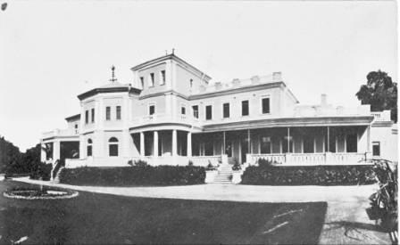 Lotarevo Manor